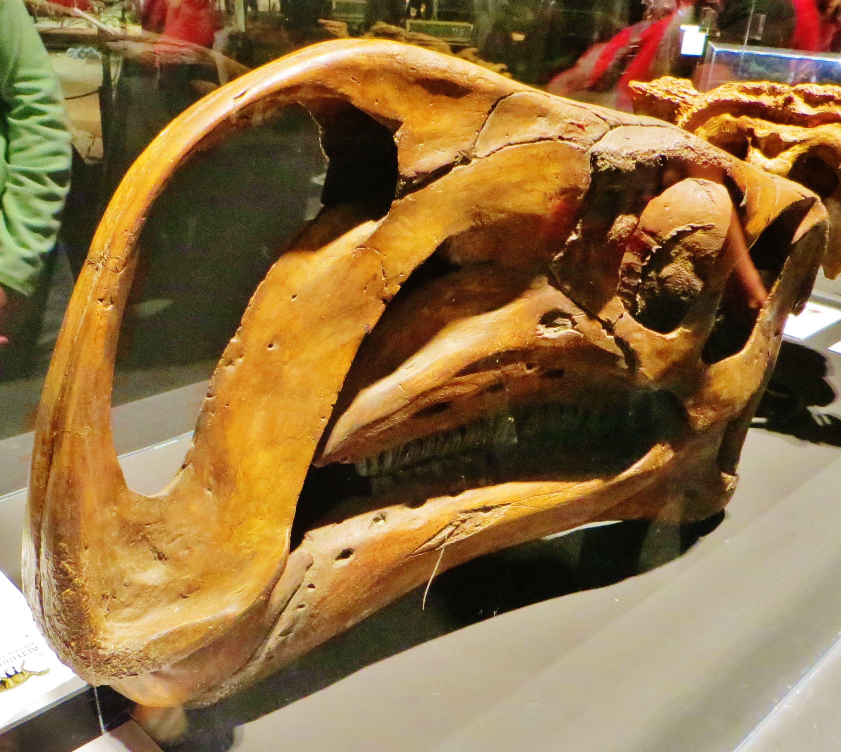 Fossil of Altirhinus, an extinct reptile - Took the picture at Dinosaurium, Prague